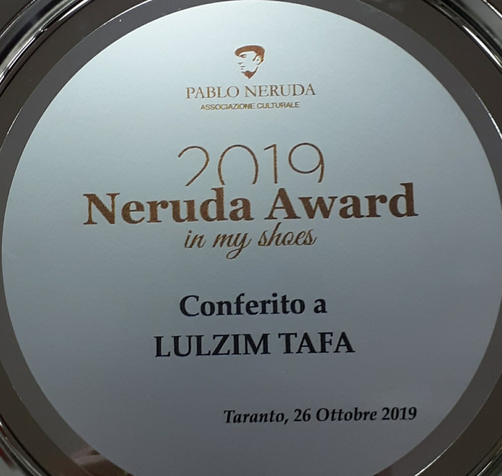 çmimi neruda